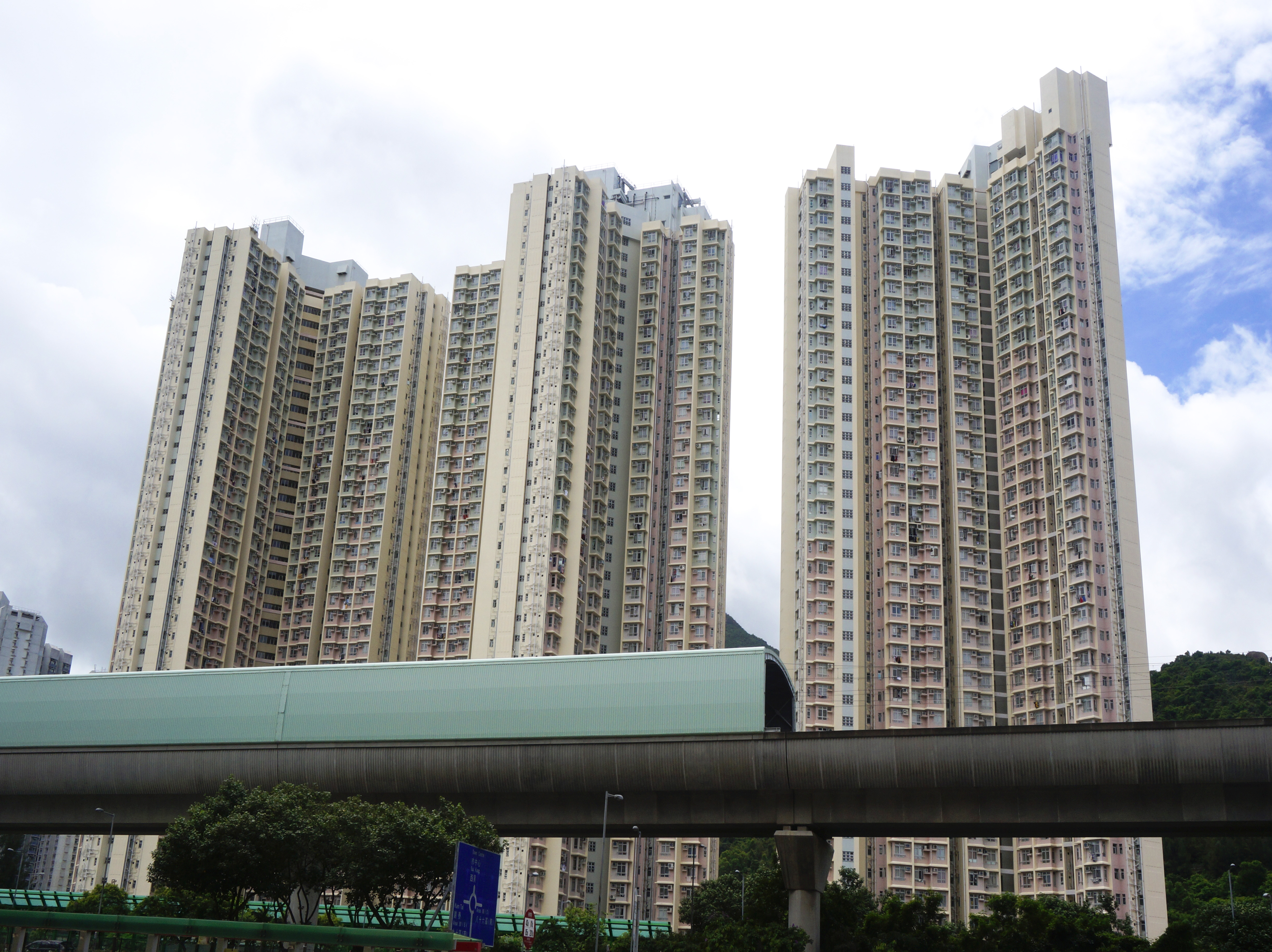 欣安邨各座大廈